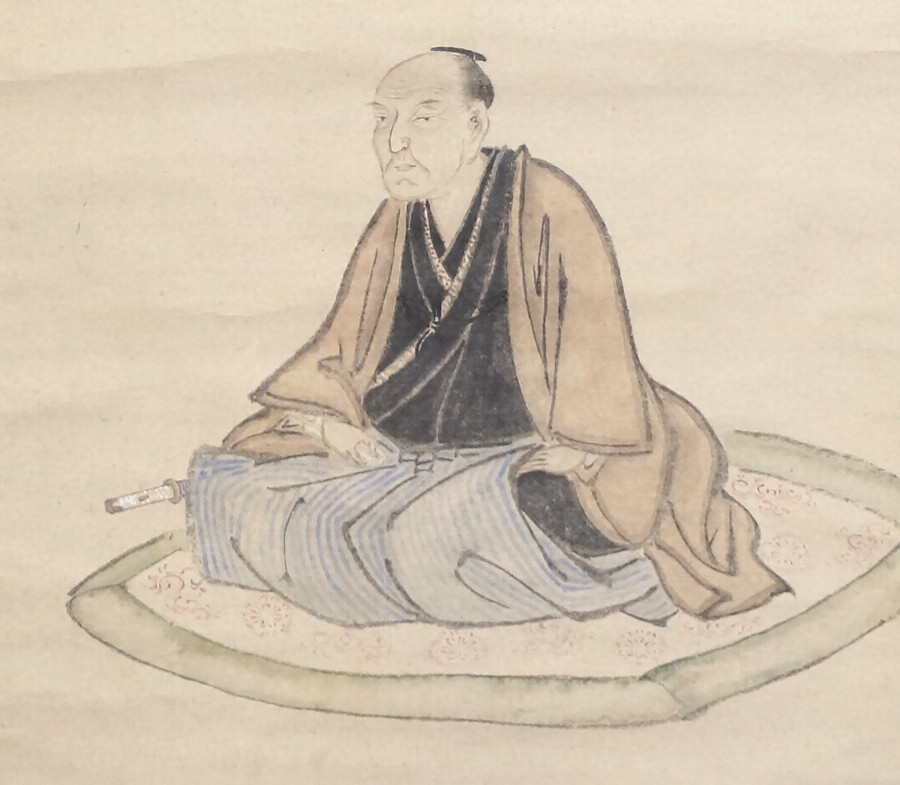 菊池海荘肖像